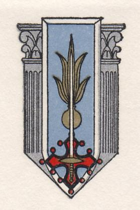 Logo de l'école militaire d'infanterie en 1964. L'école est maintenant basée à Montpellier, et le logo conserve les deux colonnes romaines de l'époque de Cherchell, tout en intégrant la croix occitane.